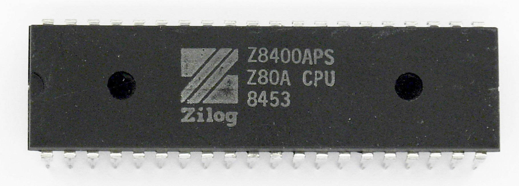 Zilog Z8400APS (Z80A CPU)